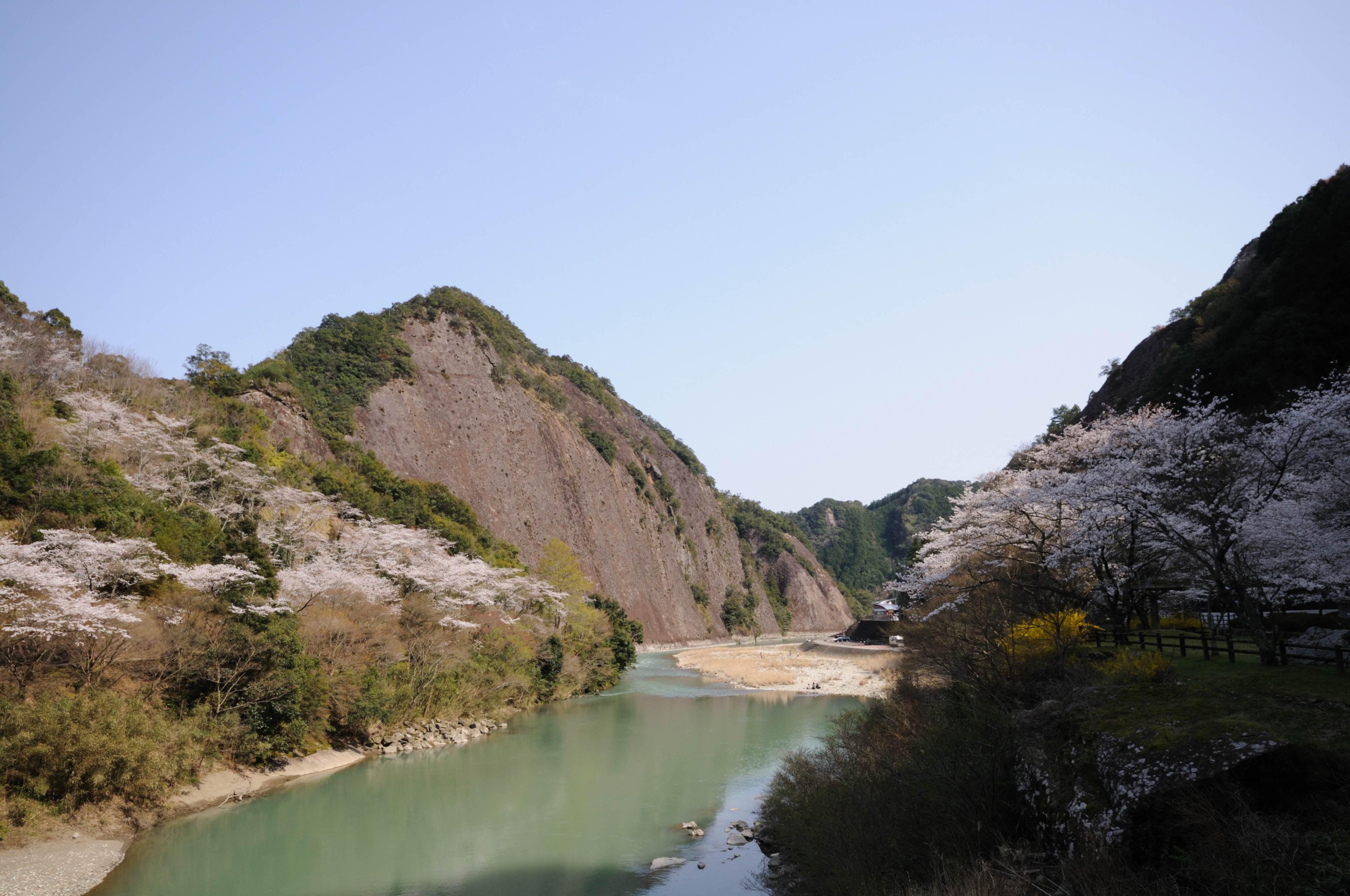 和歌山県古座川町の古座川の一枚岩